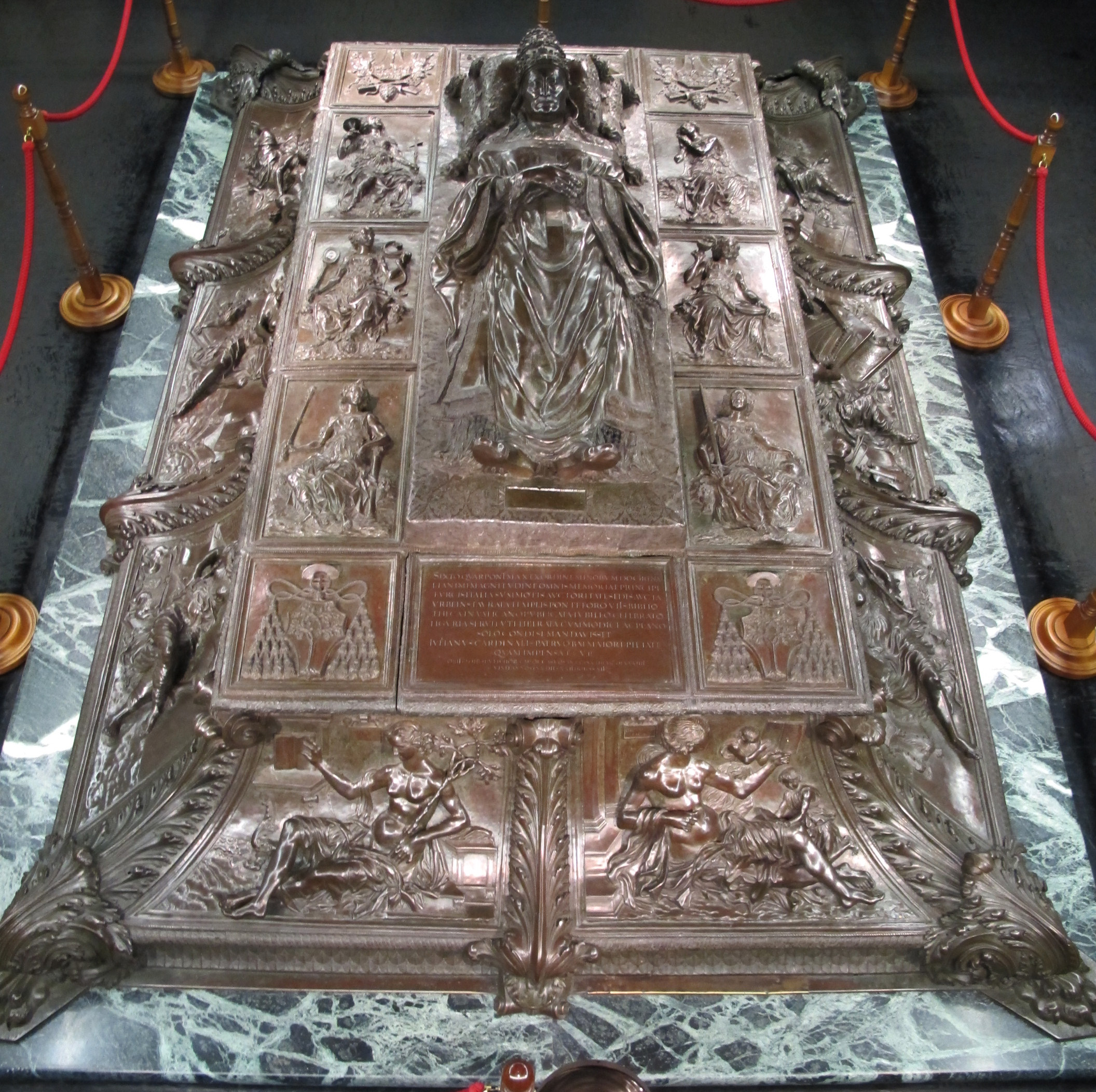 Tesoro di san pietro, tomba di sisto IV di antonio del pollaiolo